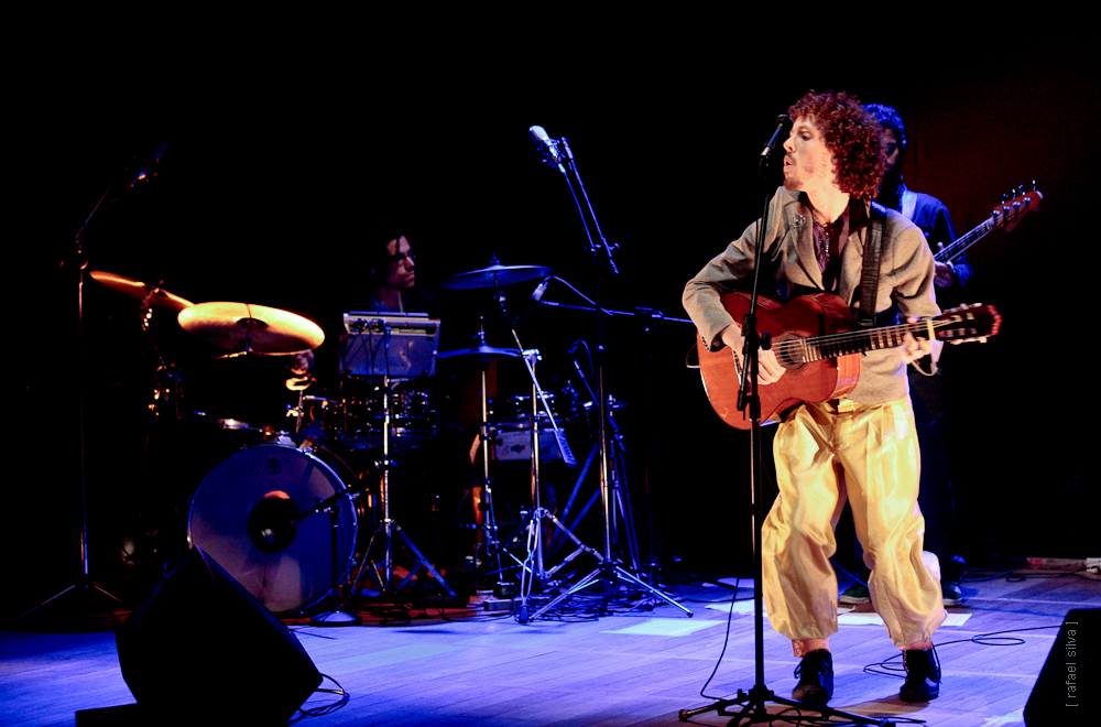 Rio de Janeiro - Solar de Botafogo